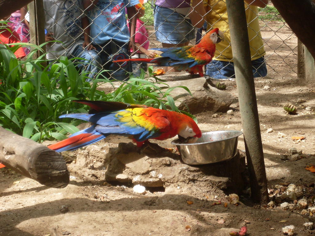 Parque Zoológico y Botánico Bararida en Barquisimeto - Venezuela